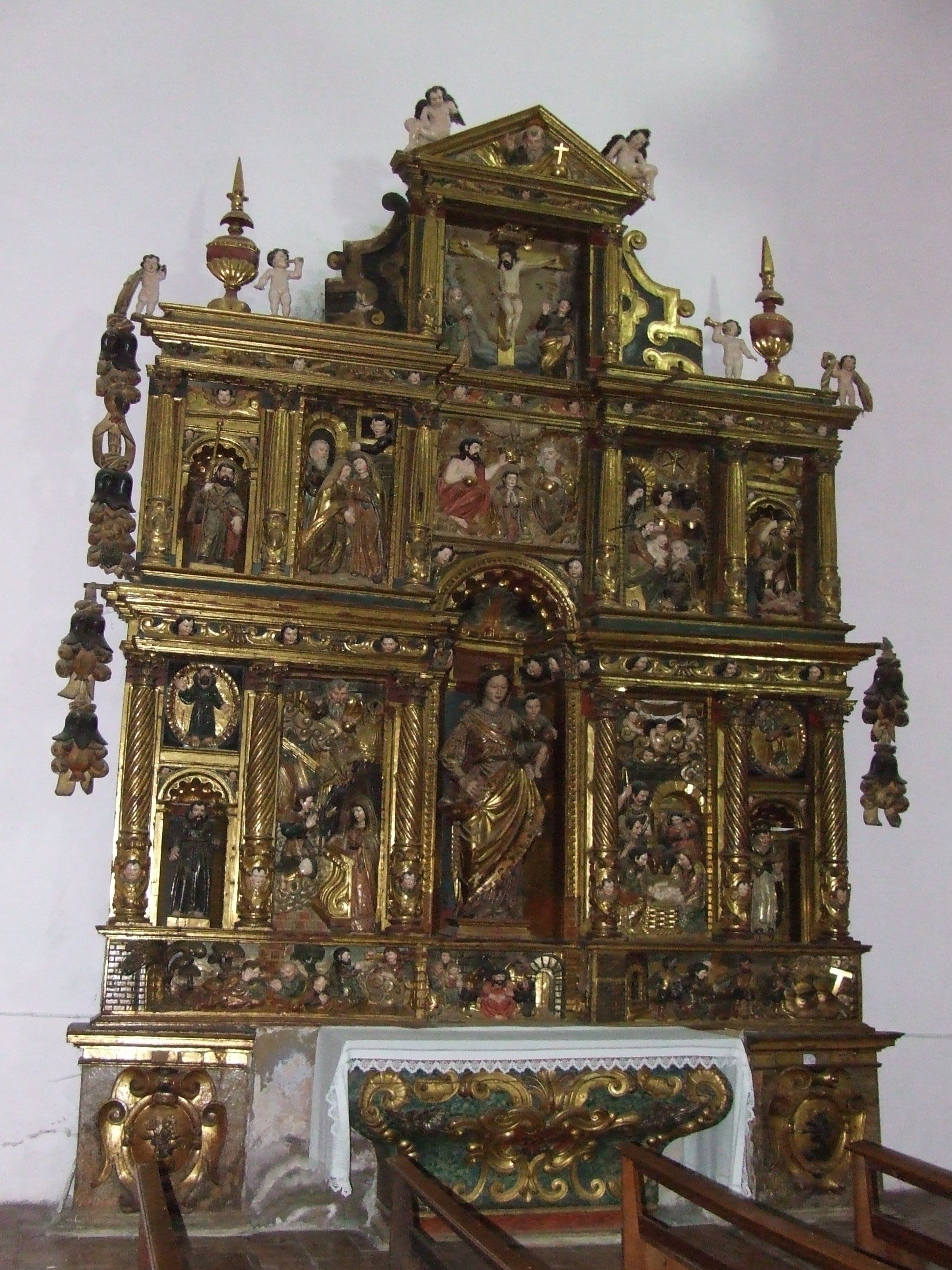 Retaule del Roser de la Mare de Déu del Remei de Guàrdia de Noguera (Castell de Mur, Pallars Jussà)